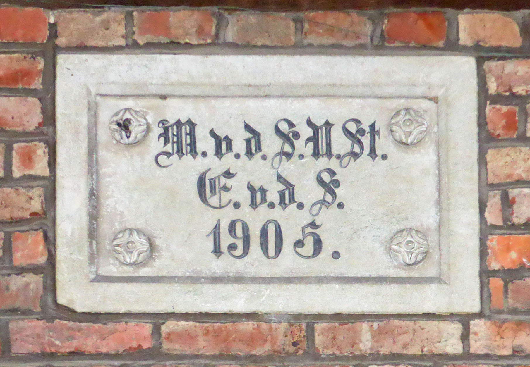 Tafel am Margarethenhof in Reislingen mit den Initialen von Matthias von der Schulenburg Nord-Steimke (1861–1929) und seiner Ehefrau Elisabeth von der Schulenburg (1873–1953) .